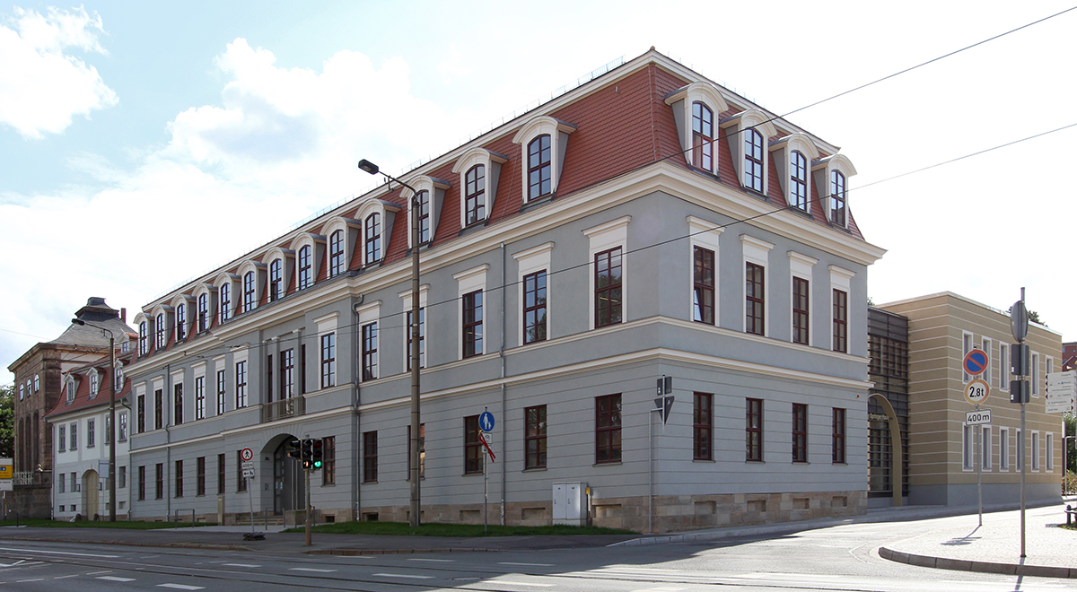 Gotha, Winterpalais, vom Ekhofplatz aus gesehen